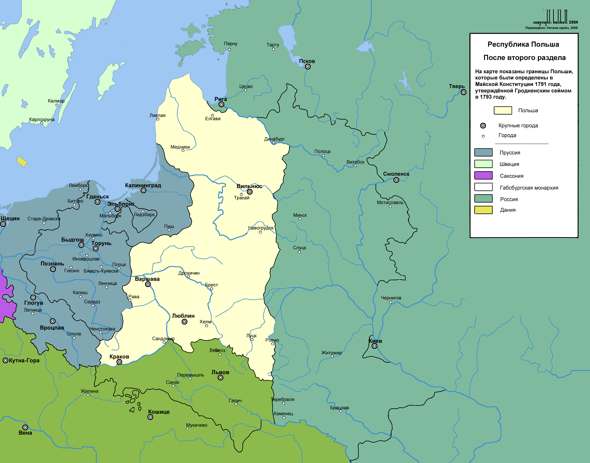 Второй раздел Речи Посполита. При создании использованы современные названия городов. Перевод Image:Rzeczpospolita Rozbiory 2.png